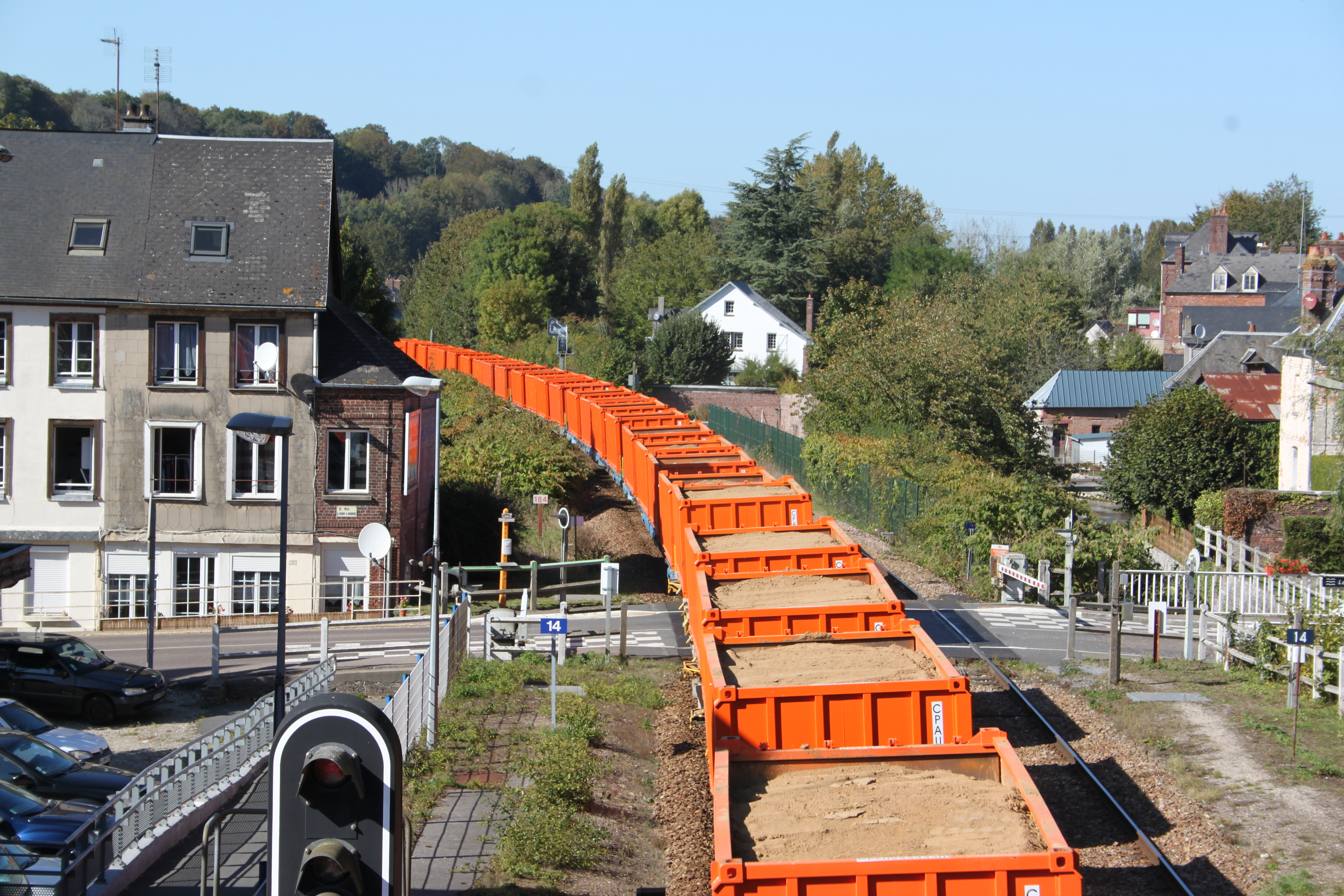 Longueville-sur-Scie(76), ligne de Malaunay à Dieppe, PN14, passage d'un train de terre provenant de Rouxmesnil-Bouteilles à destination du port de Rouen . (tiré par une Unité Multiple(UM) composé de deux Vossloh G 1206 .